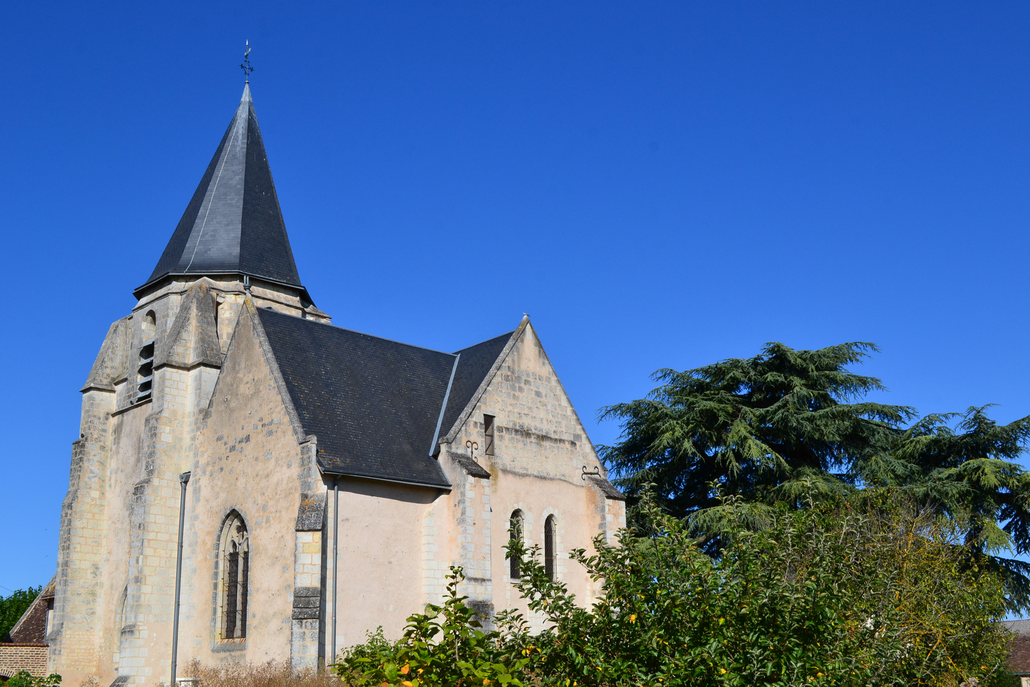 L'église dépendait, au 12e siècle, de l'abbaye de Saint-Georges. Elle se compose d'une nef précédée d'un porche (16e siècle) , et d'un chœur à chevet plat de style angevin, que flanquent au sud un clocher et une chapelle (14e ou 15e siècle). Le portail occidental et le chœur datent de la fin du 12e ou du début du 13e siècle. En 1977, des peintures murales ont été découvertes représentant des scènes historiées semblant dater du 14e siècle. .